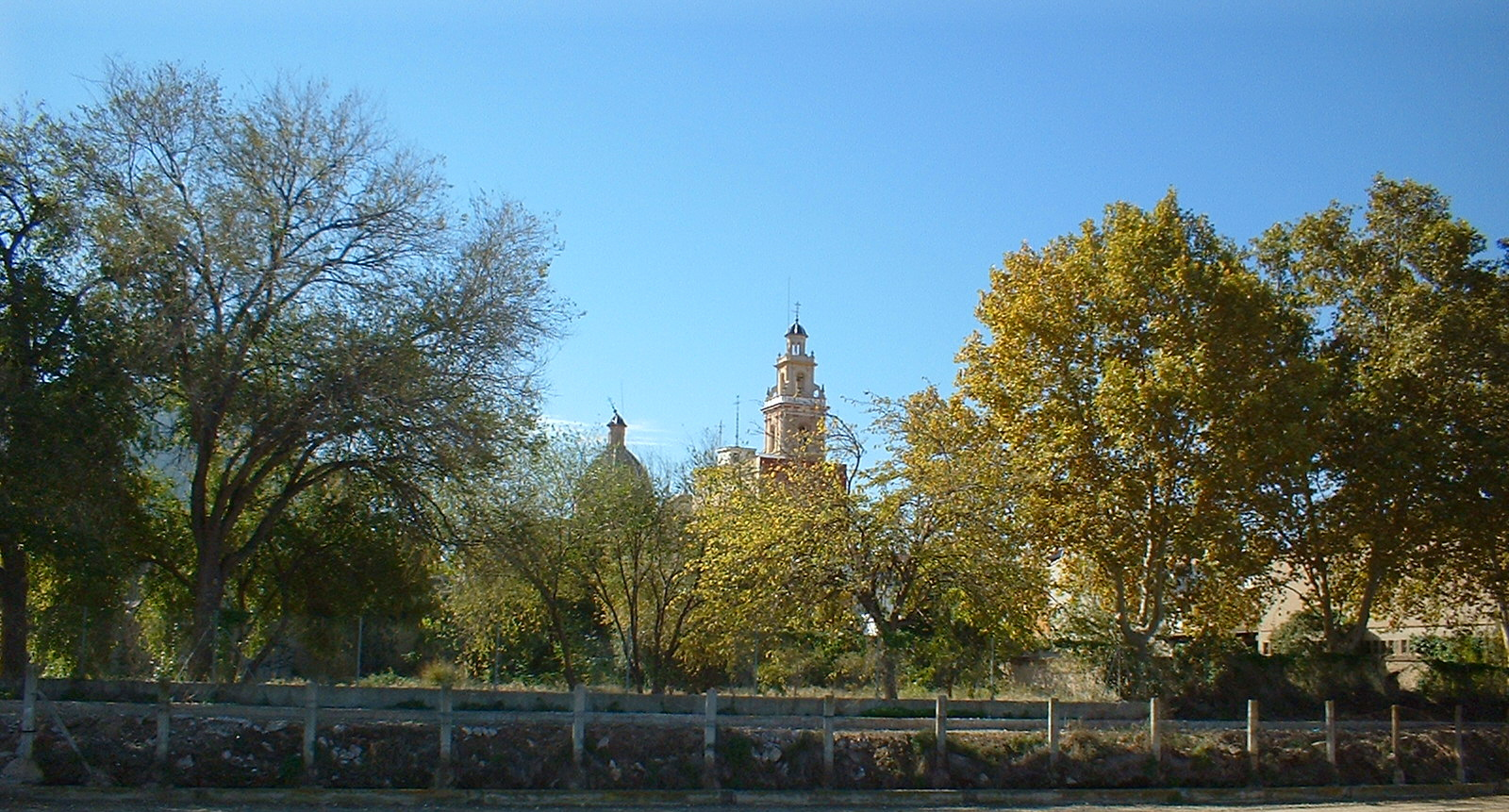 1r de novembre a Burjassot